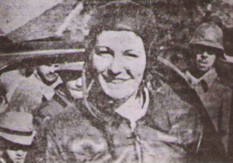 A corredora brasileira do Rio Grande do Sul, NIlza Campos Ruschel, em 1942